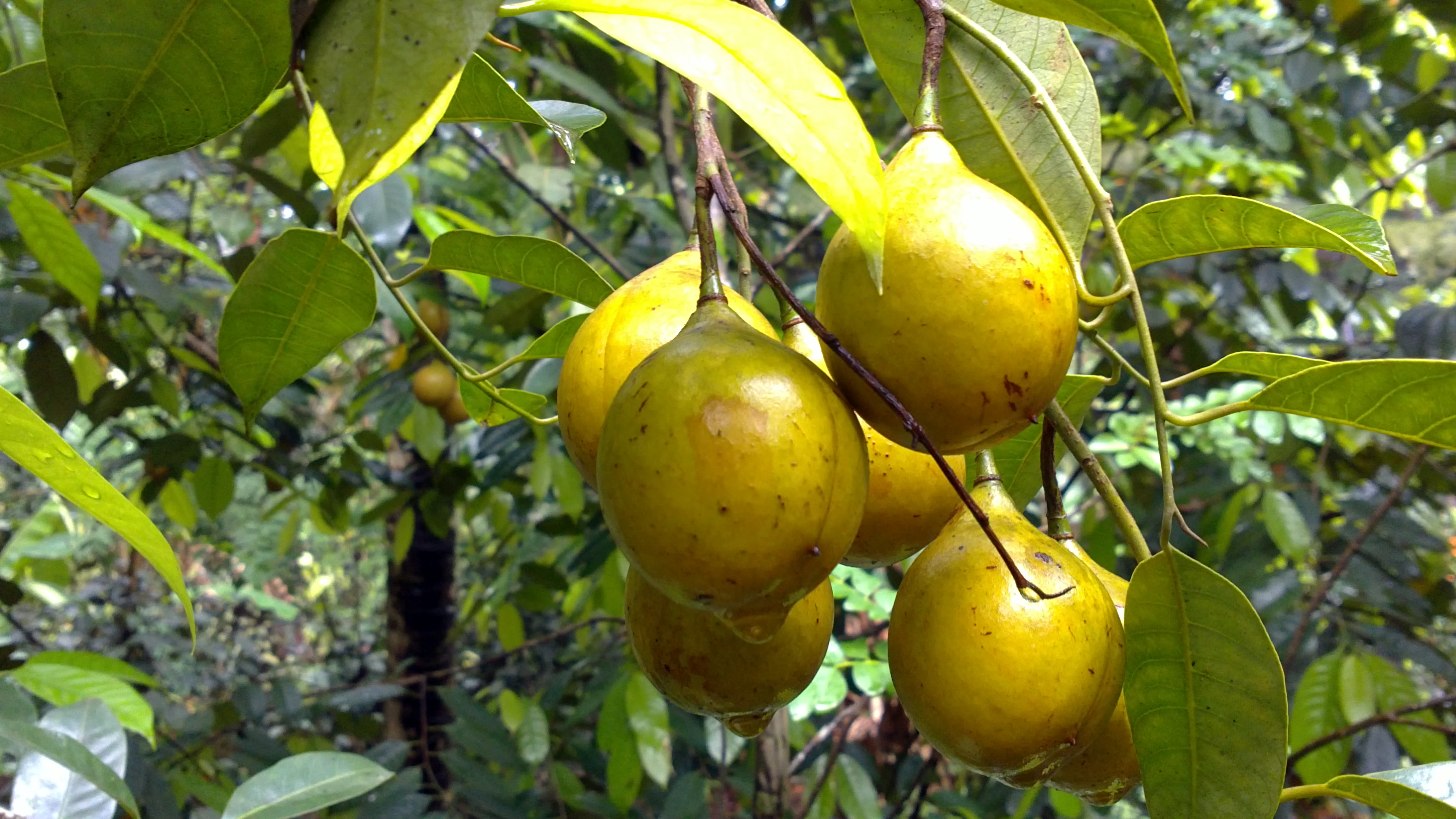 ജാതിക്കായ